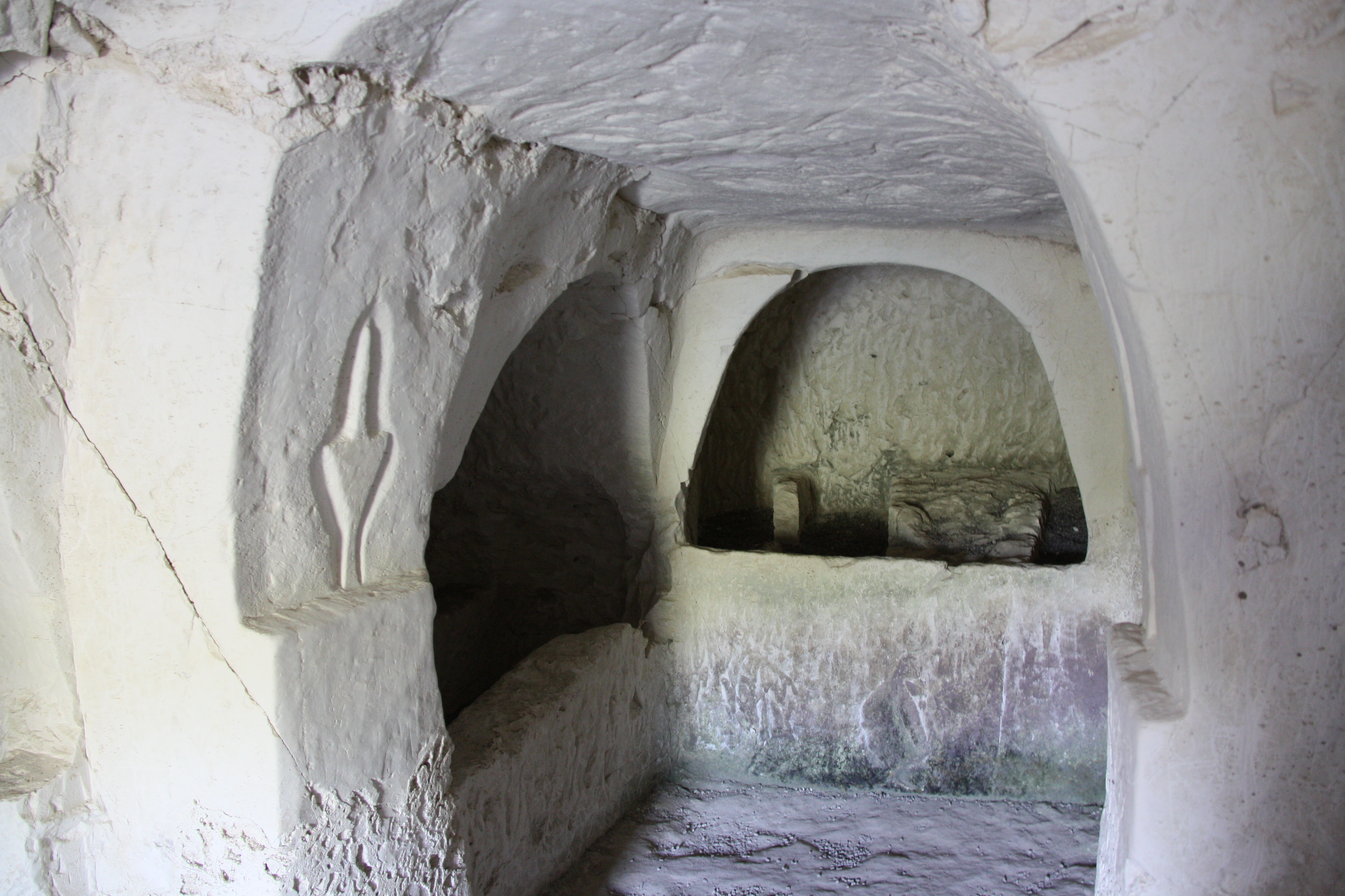 בית שערים הוא אתר ארכאולוגי השוכן בגליל התחתון. במקום התקיים יישוב יהודי חשוב בתקופת בית שני, המשנה והתלמוד. שיא פריחת היישוב הייתה בין המאות ה-2 וה-4 לספירה, עת שהתה בה הסנהדרין בראשותו של רבי יהודה הנשיא. בית שערים הקדומה ממוקמת על גבעת שייח' אבריק ליד קריית טבעון של ימינו. הגבעה נמצאת על אחת מהשלוחות הדרומיות של הגליל התחתון וניתן להשקיף ממנה על עמק יזרעאל מדרום-מזרח ועל הר הכרמל ממערב.